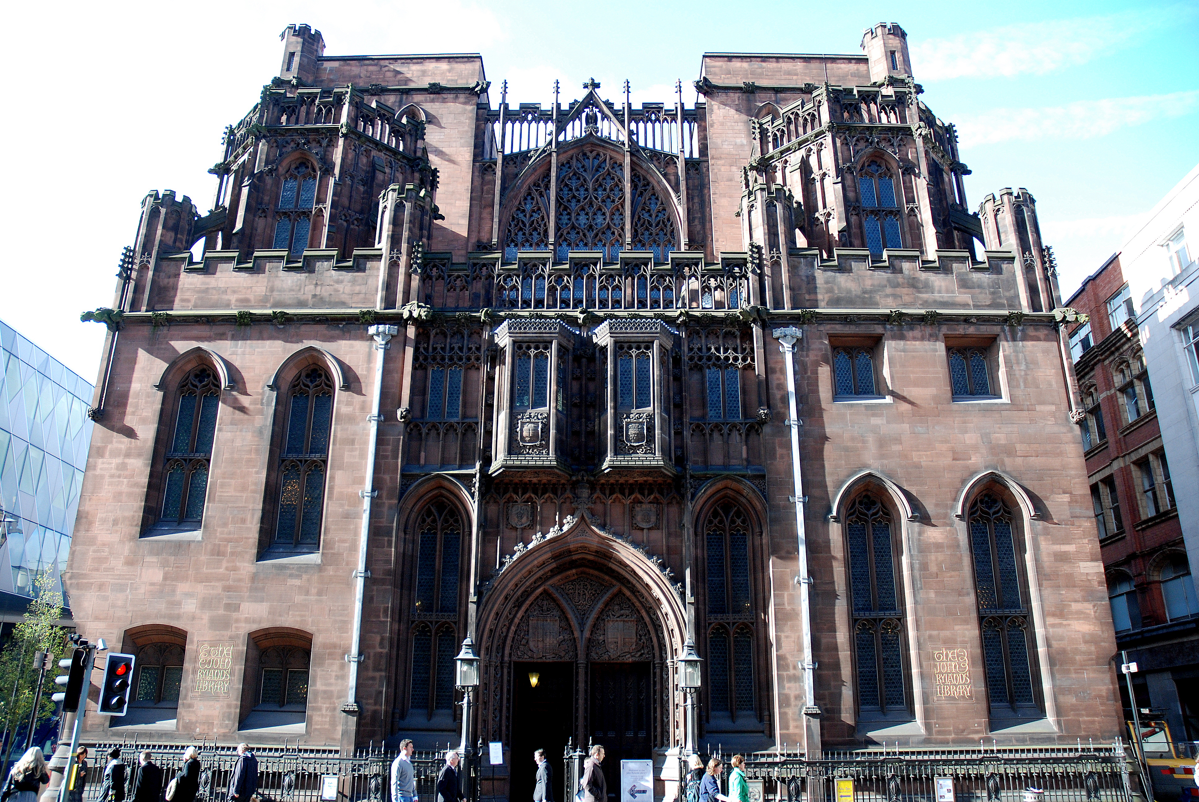 De "John Rylands Library" in Manchester, Engeland